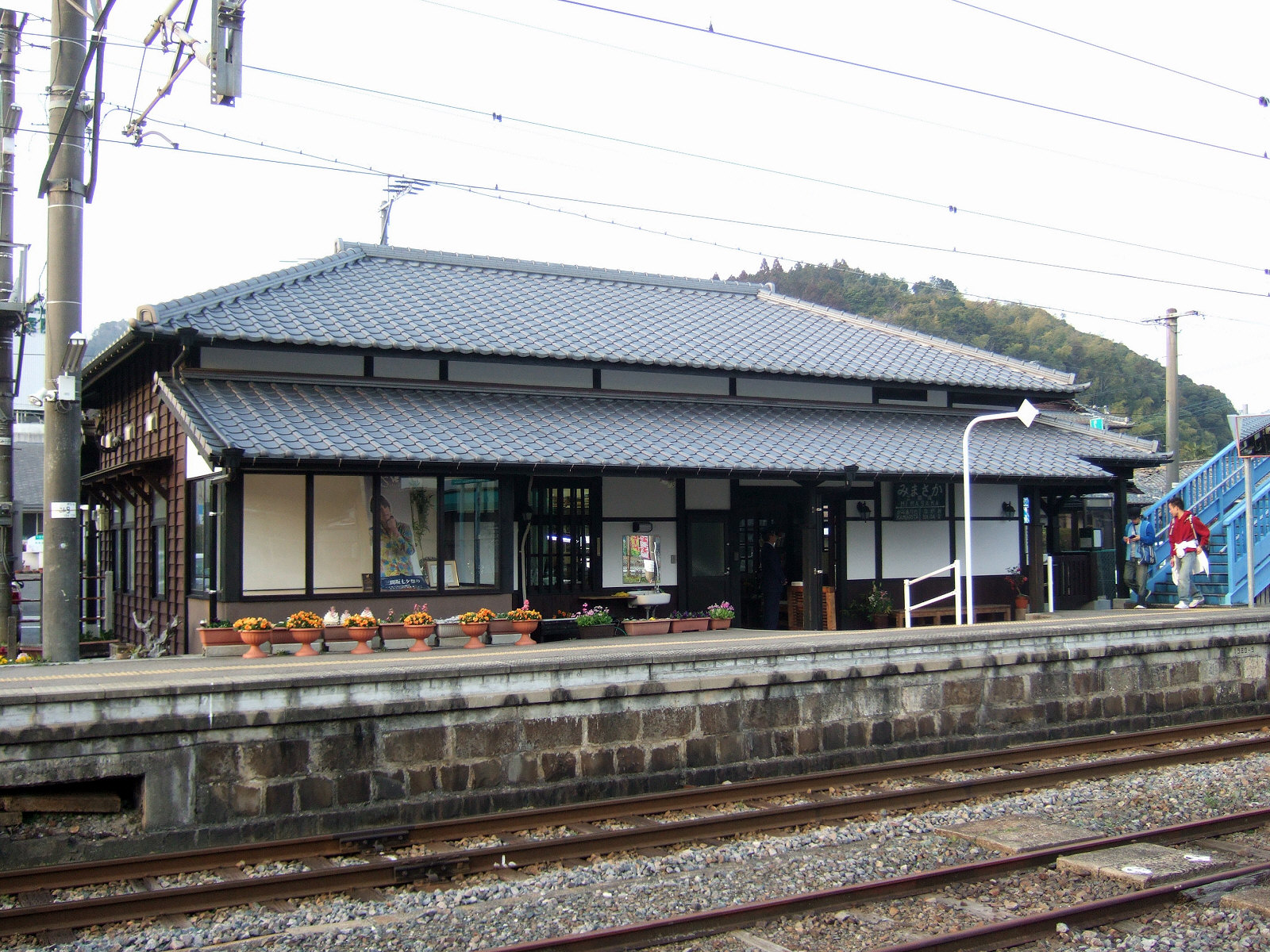 JR三間坂駅（駅舎と肥前山口方面ホーム）JR Mimasaka Station